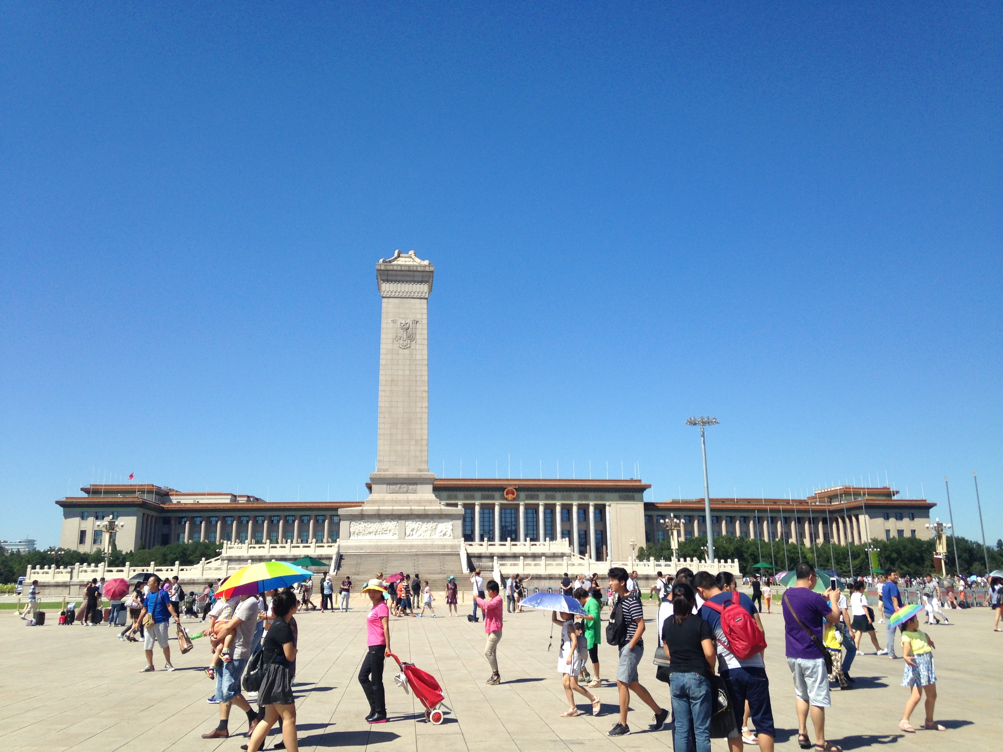 人民英雄紀念碑と人民大会堂